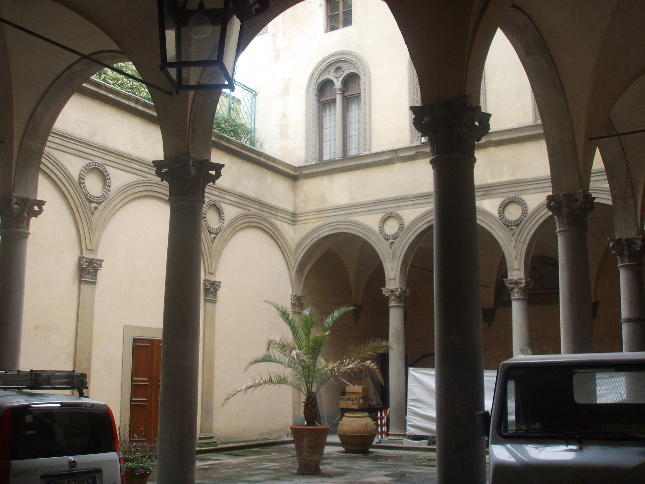 Palazzo_Pazzi windows in Florence, italy